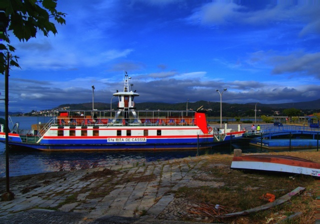 Caminha [P], 2011.